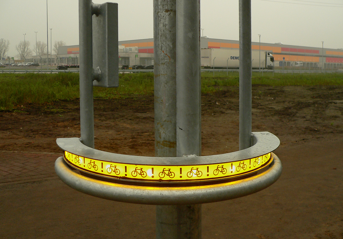 Bike-Flash Garbsen Burgstraße